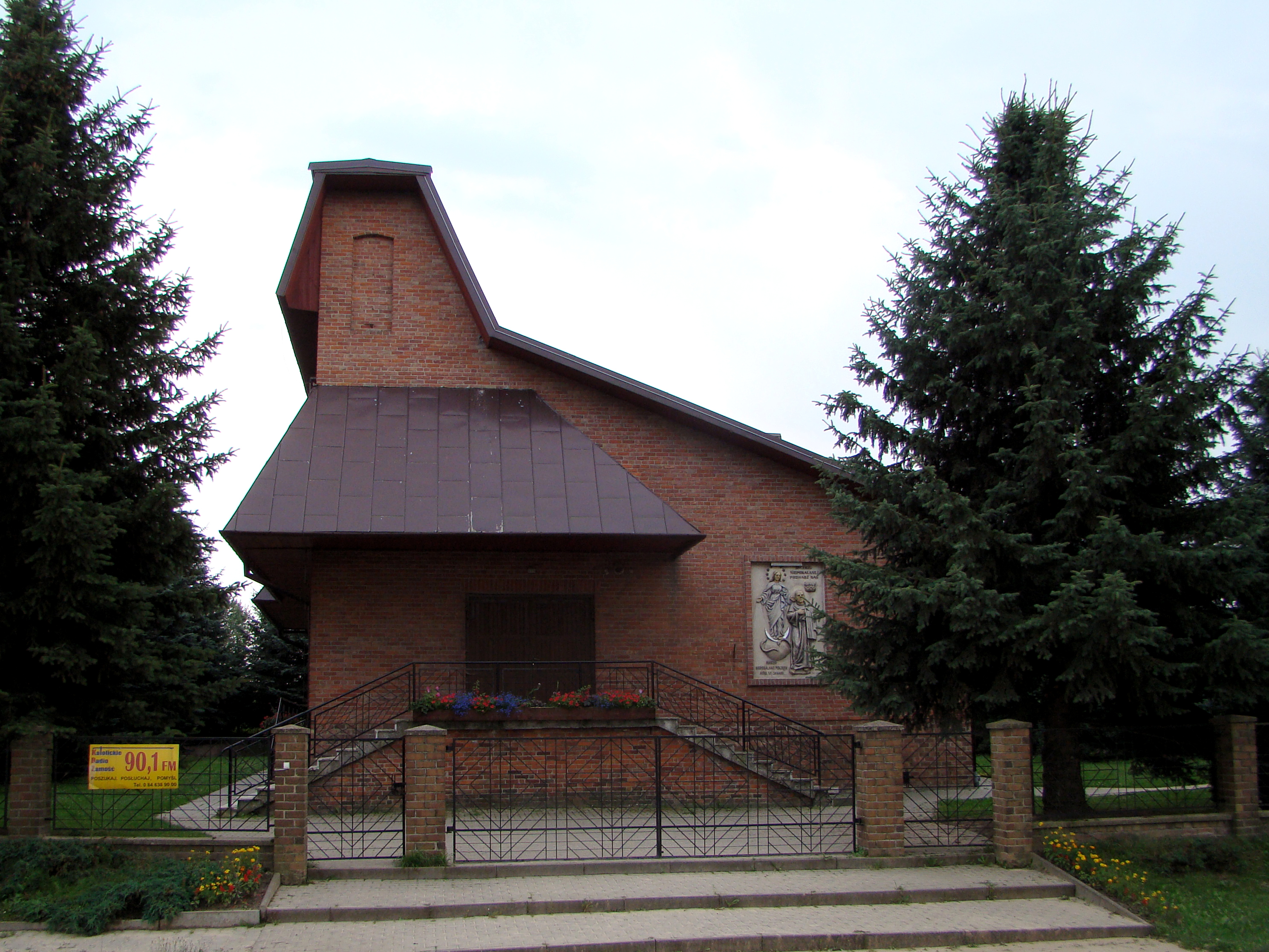 Deszkowice Pierwsze - kościół pw. Świętego Maksymiliana Kolbego